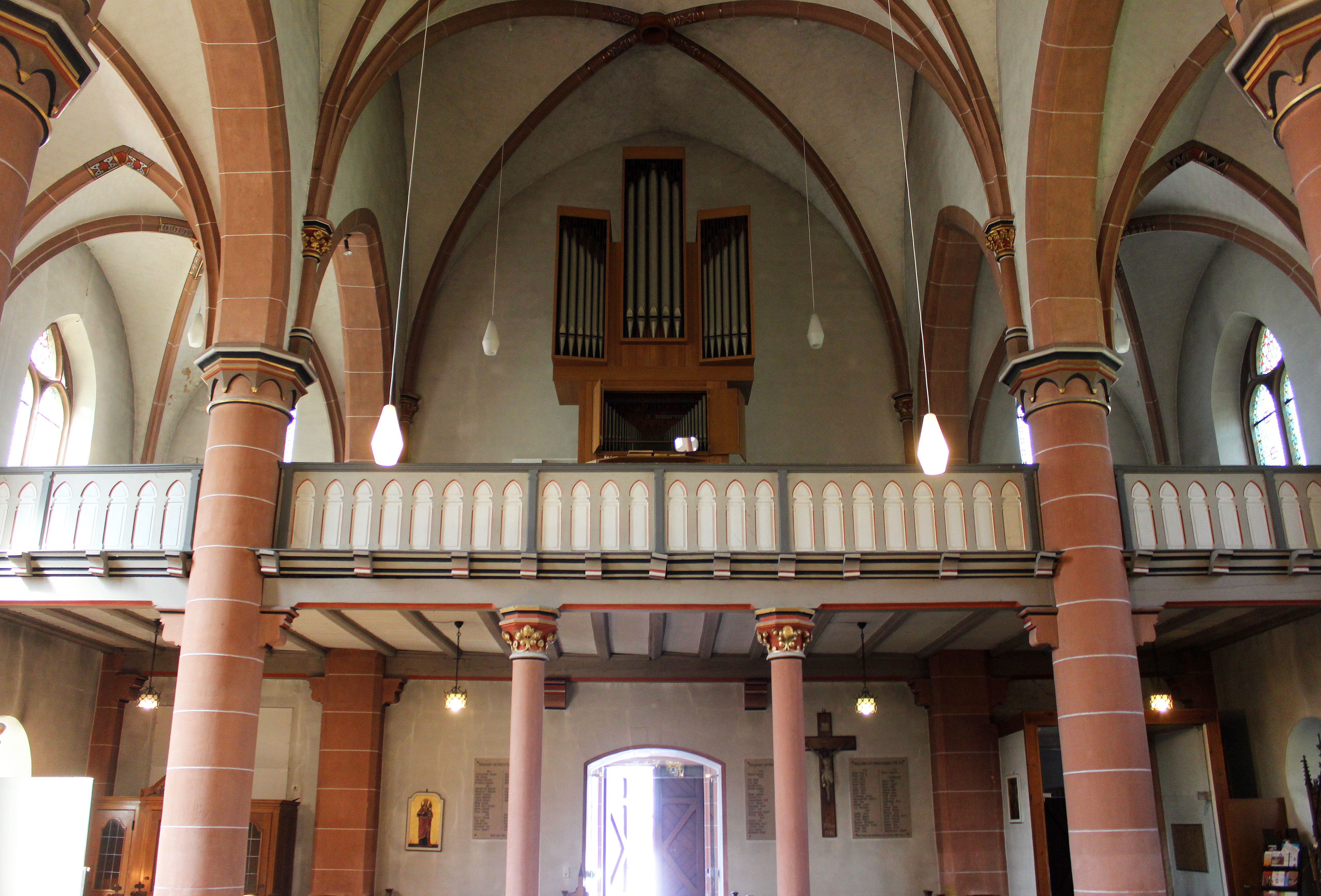 Orgelempore der katholischen Pfarrkirche Heilige Familie in Hangard, einem Stadtteil von Neunkirchen/Saar.